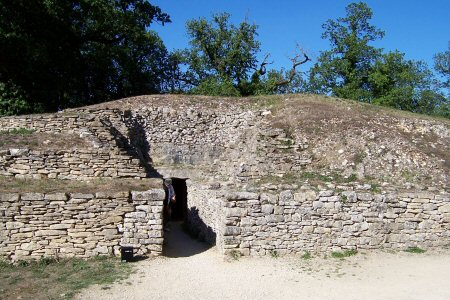 Tumulus - Bougon - Deux-Sèvres - France